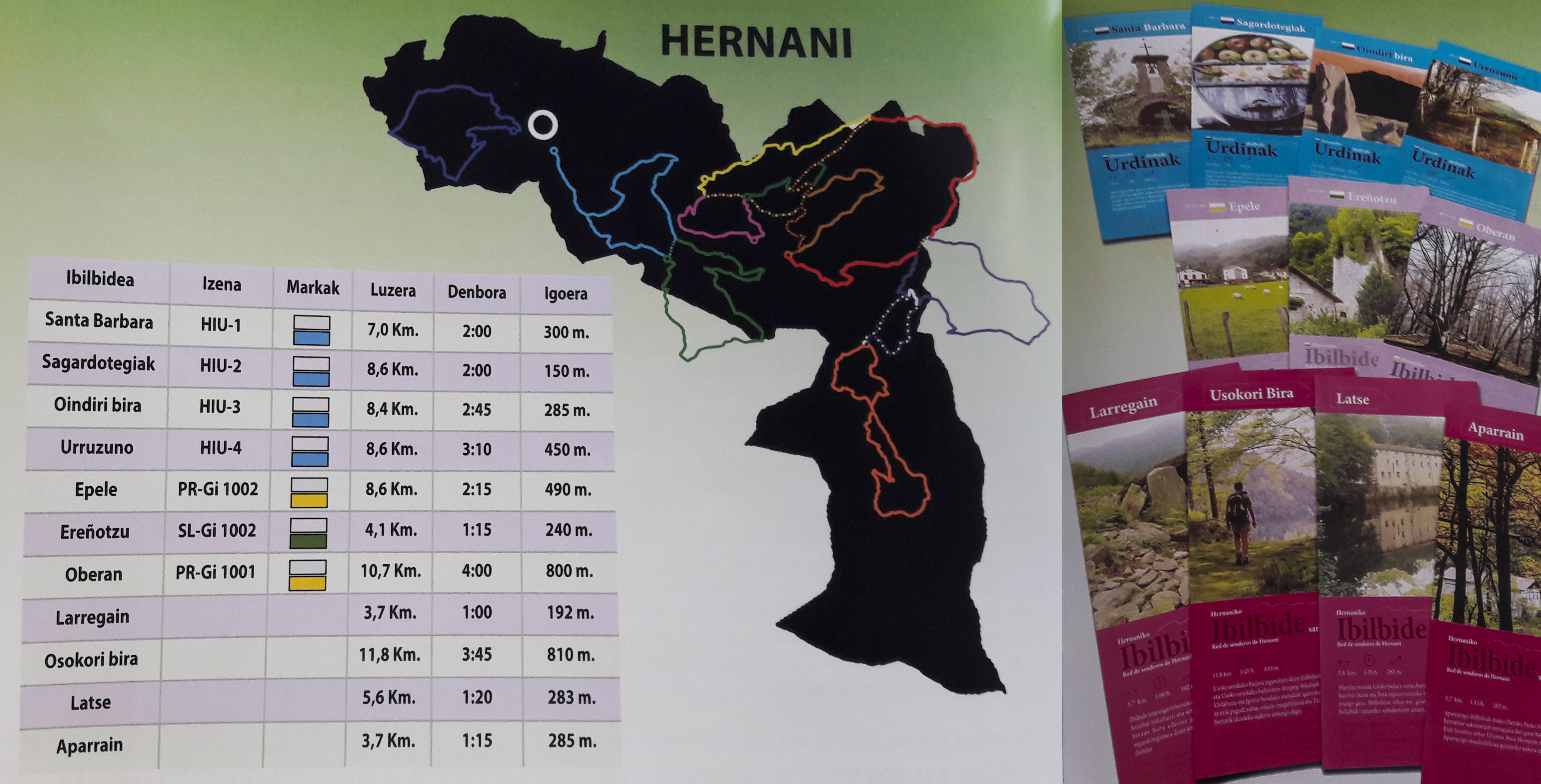 Hernaniko Ibilbide Sarea